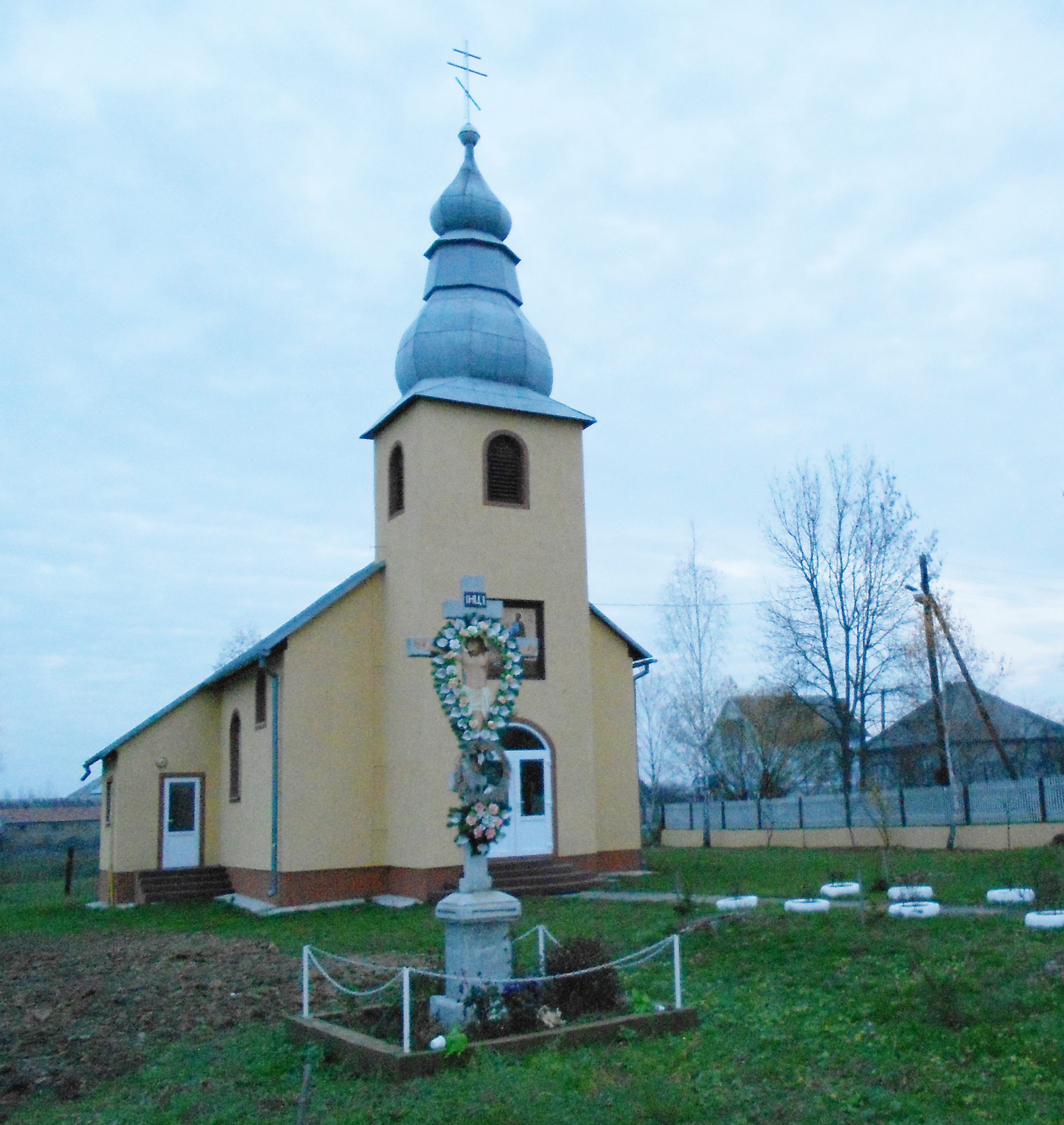 Православна церква в с. Горонглаб